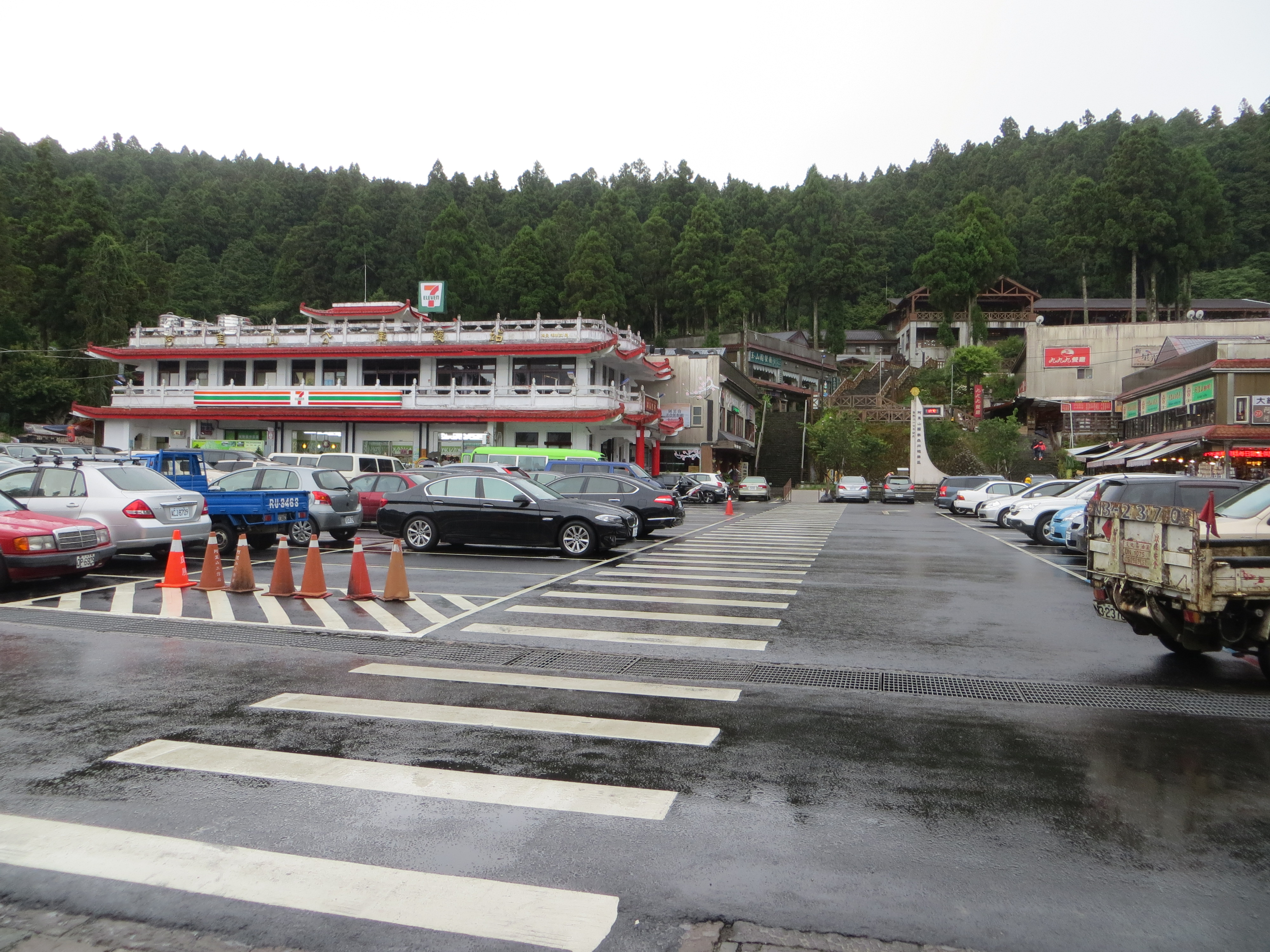 2015年7月8日，自阿里山遊客中心正門望向公車站(左)、中央階梯(中右)，前為小客車停車場。